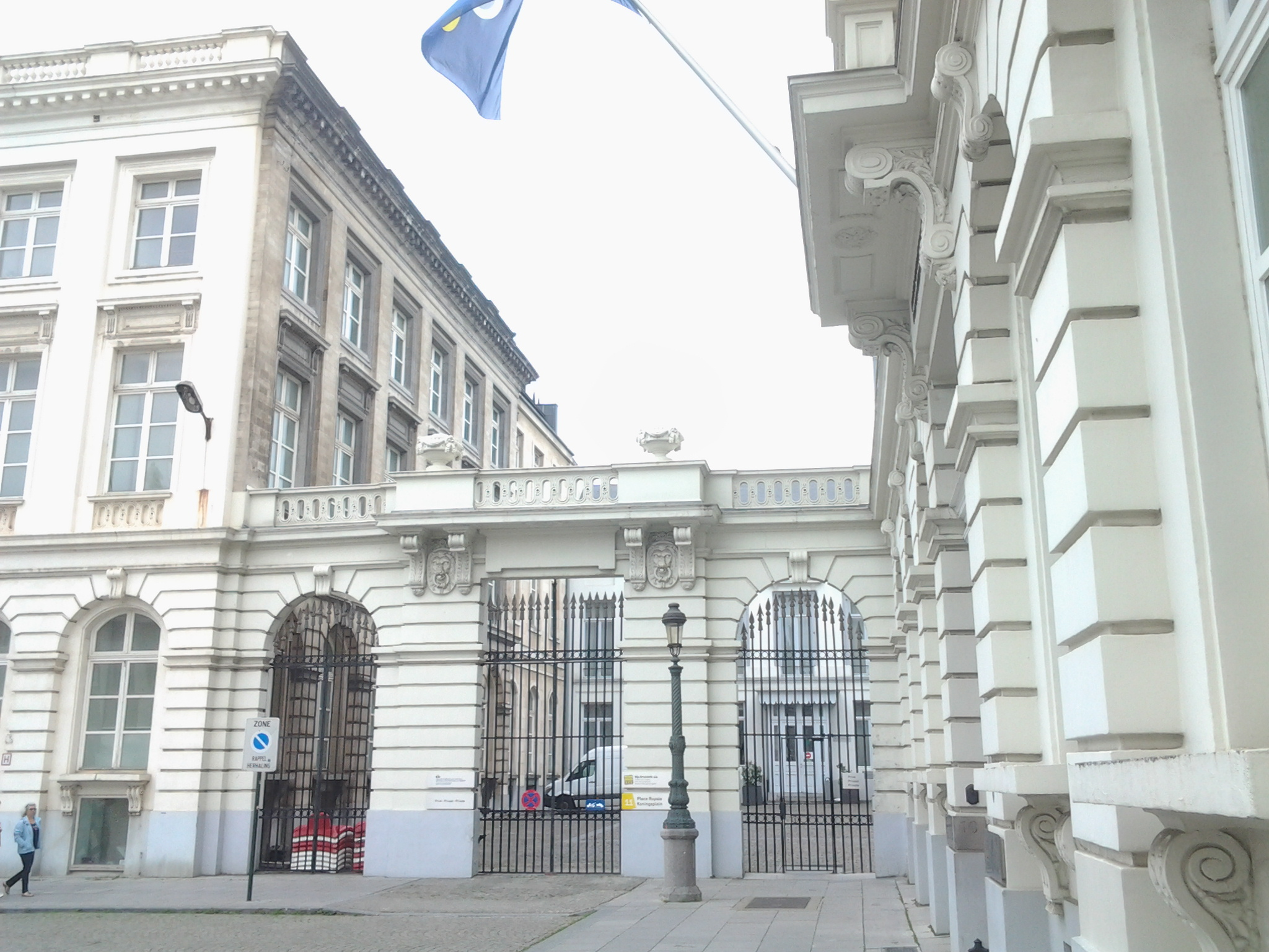 Portique reliant l'Hôtel de Spangen à l'Hôtel de Grimbergen - juin 2016